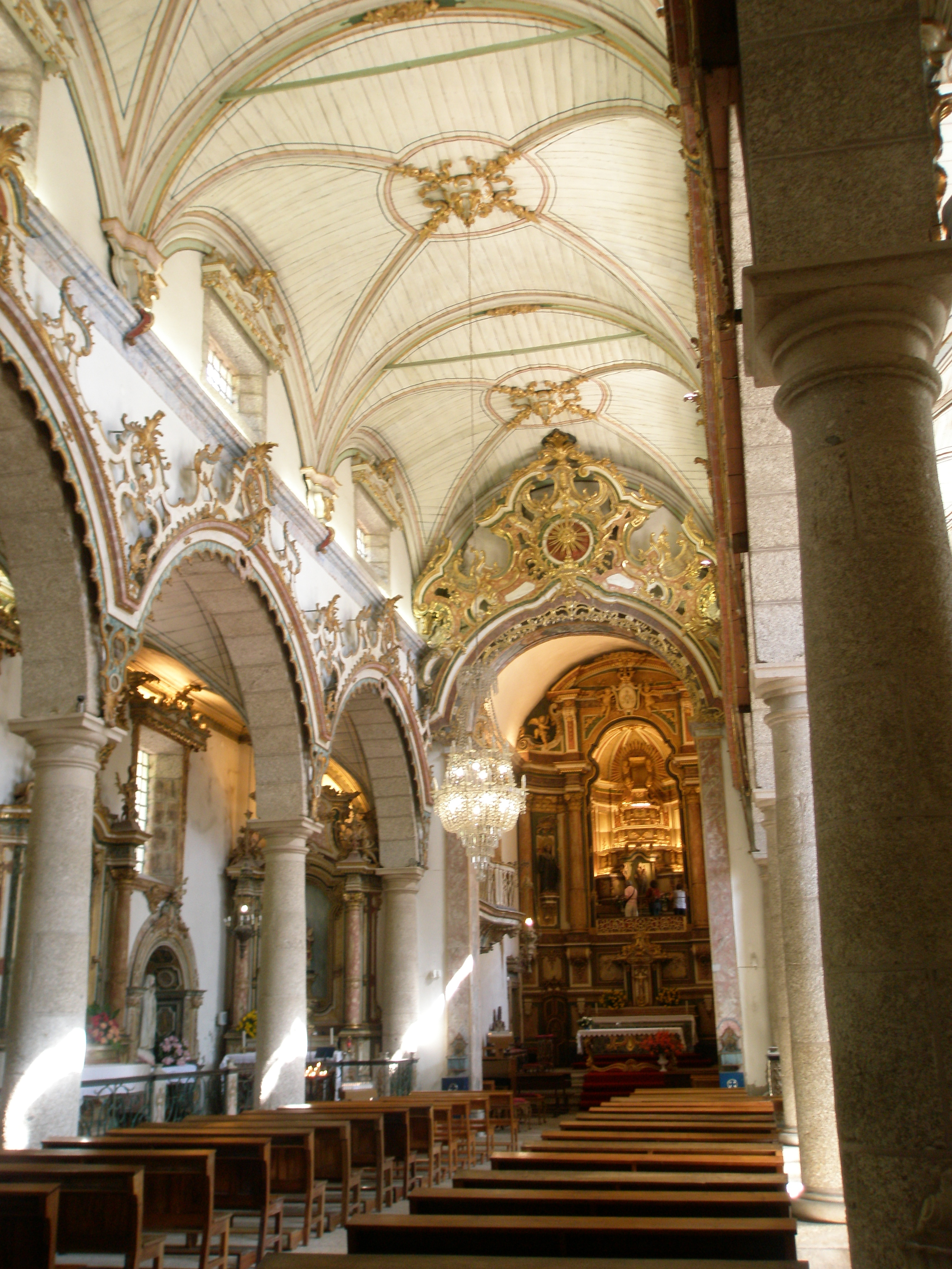 Interior do Santuário de Nossa Senhora da Abadia